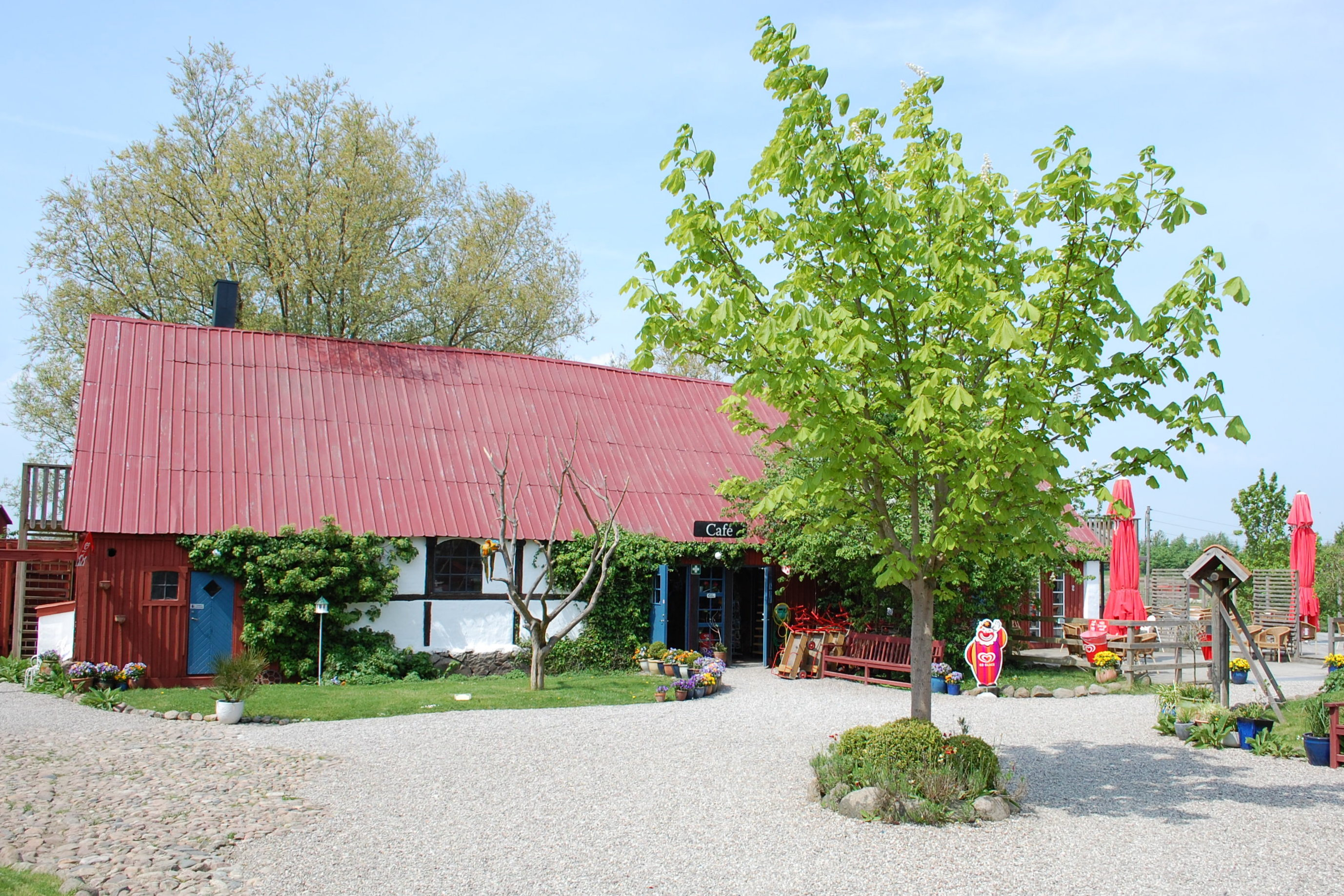 Cafe im Tierpark Ystad